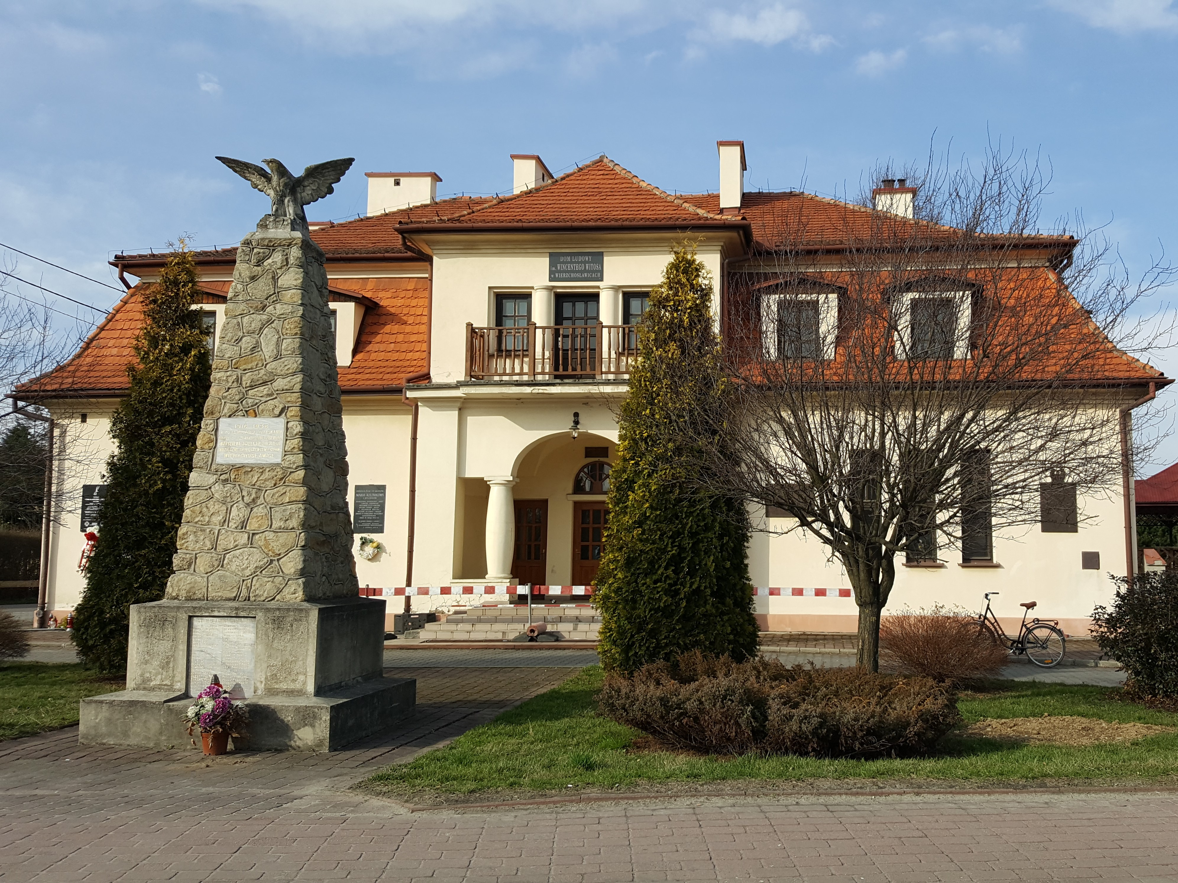 Wierzchosławice - dom ludowy im. W. Witosa, 1924